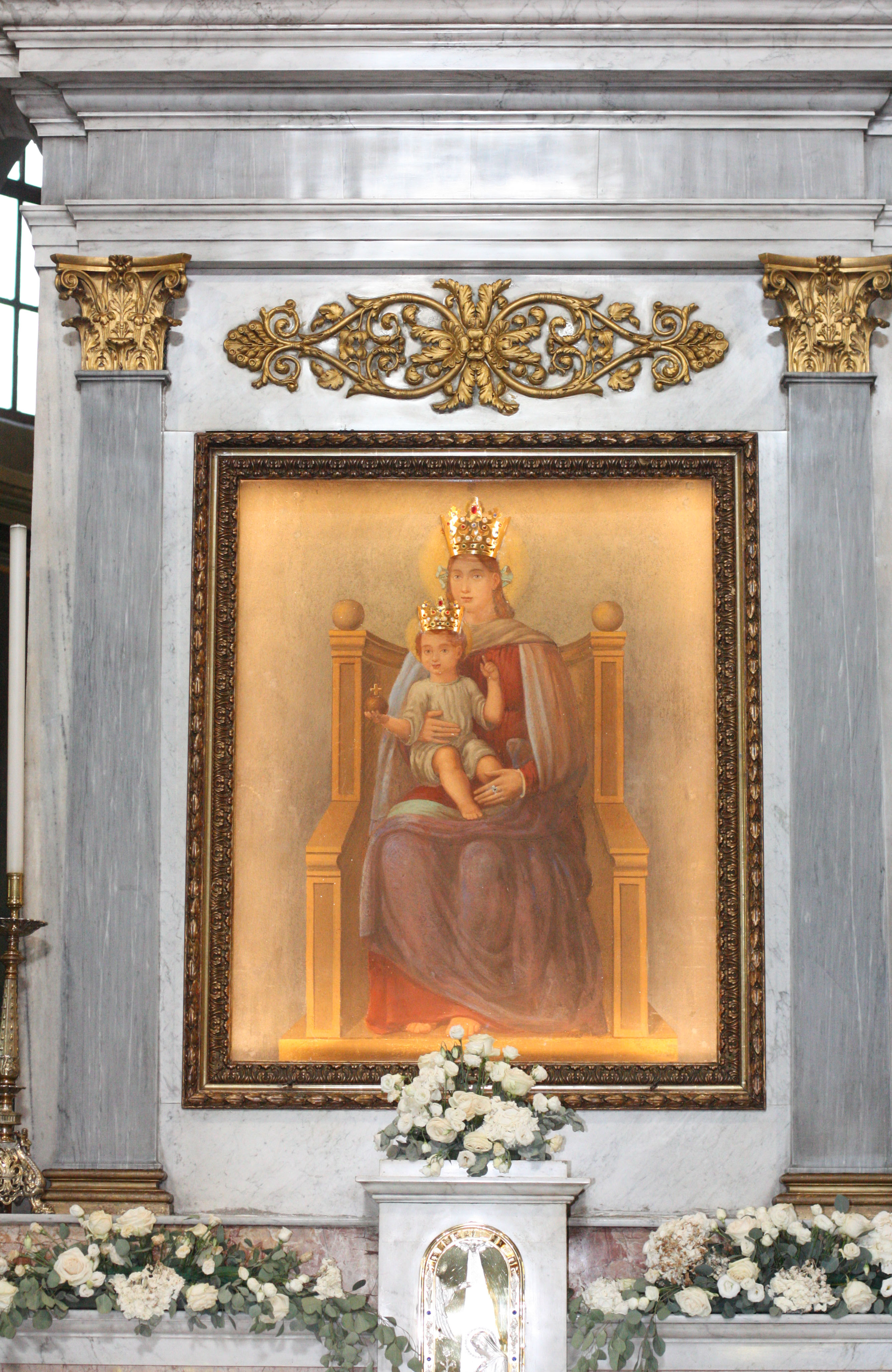 Santuario della Madonna del Boden a Ornavasso. Quadro dell'altare